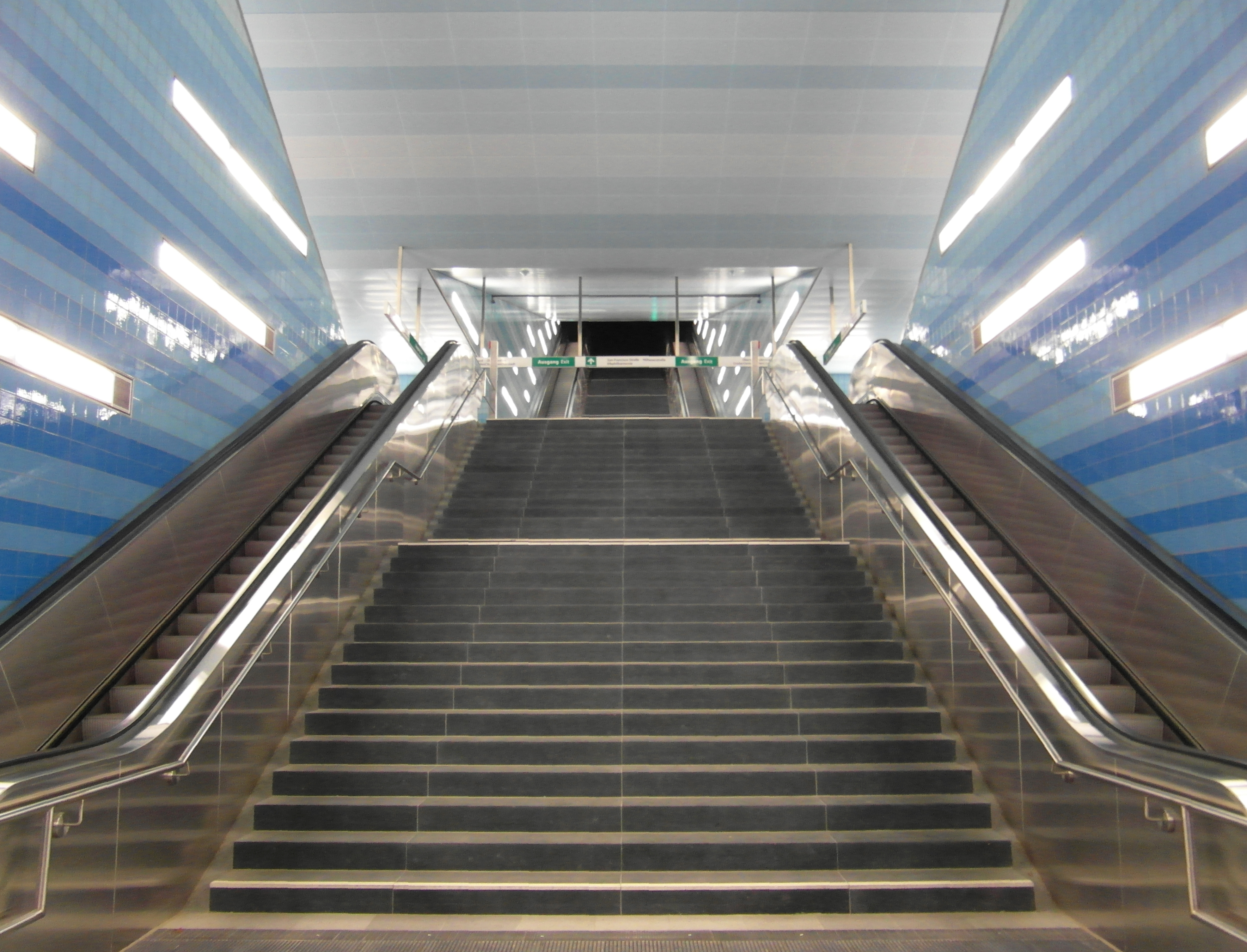 U-Bahnhof Überseequartier in Hamburg